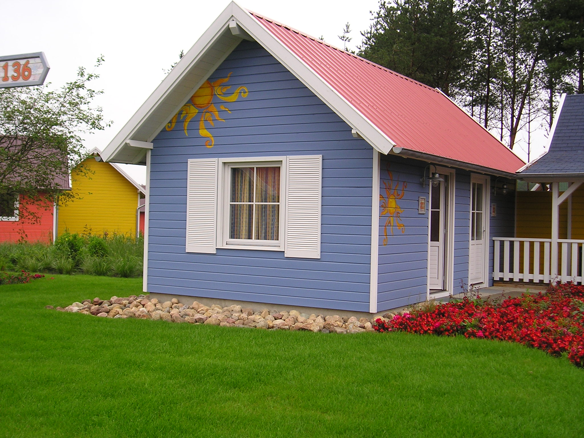 Ein Holzhäuschen des Holidaycamps im Heide-Park Soltau